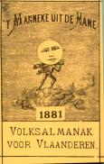 Cover of almanac 't Manneke uit de Mane, 1881, province of West Flanders, Belgium